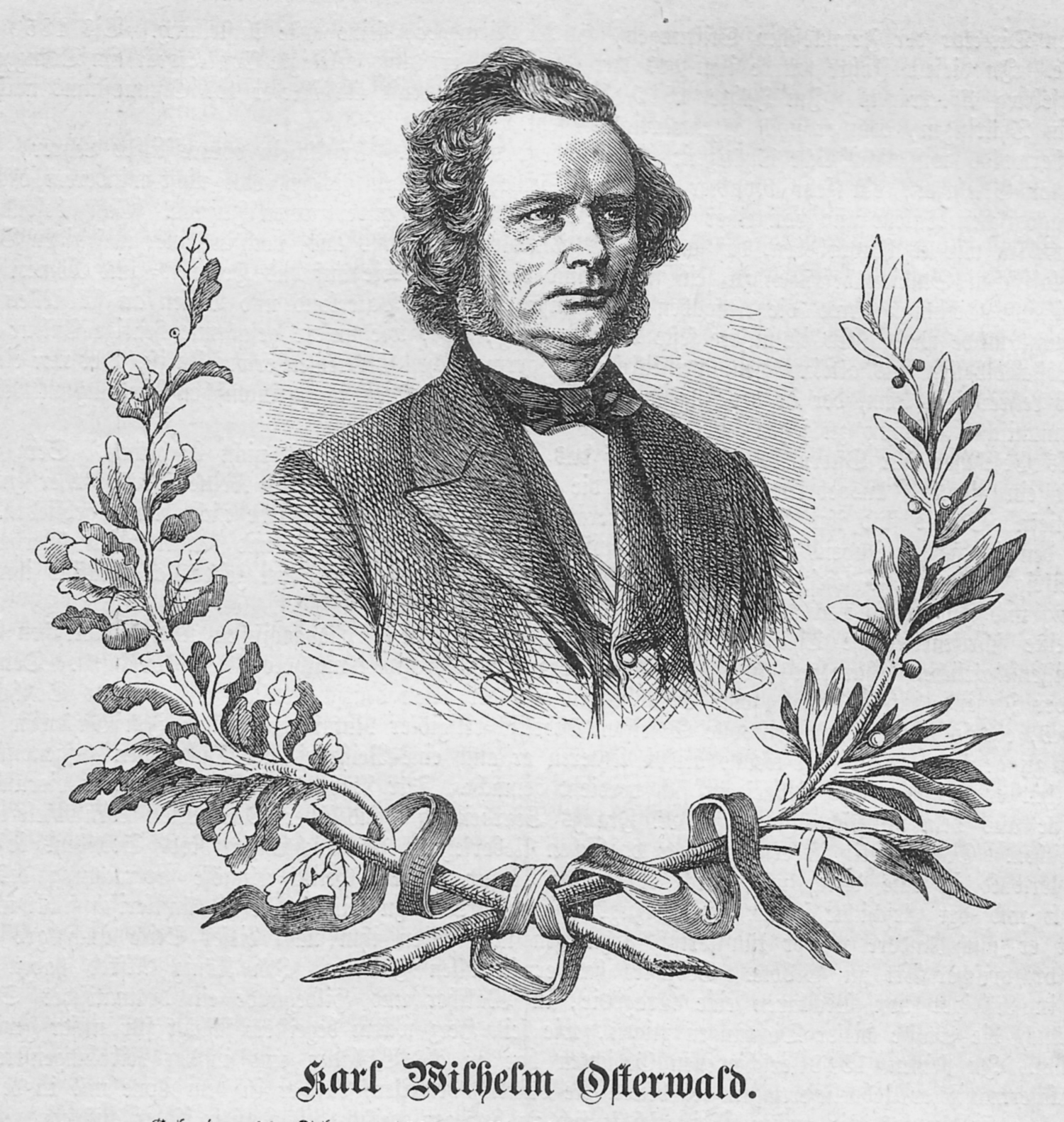 Porträt Karl Wilhelm Osterwald